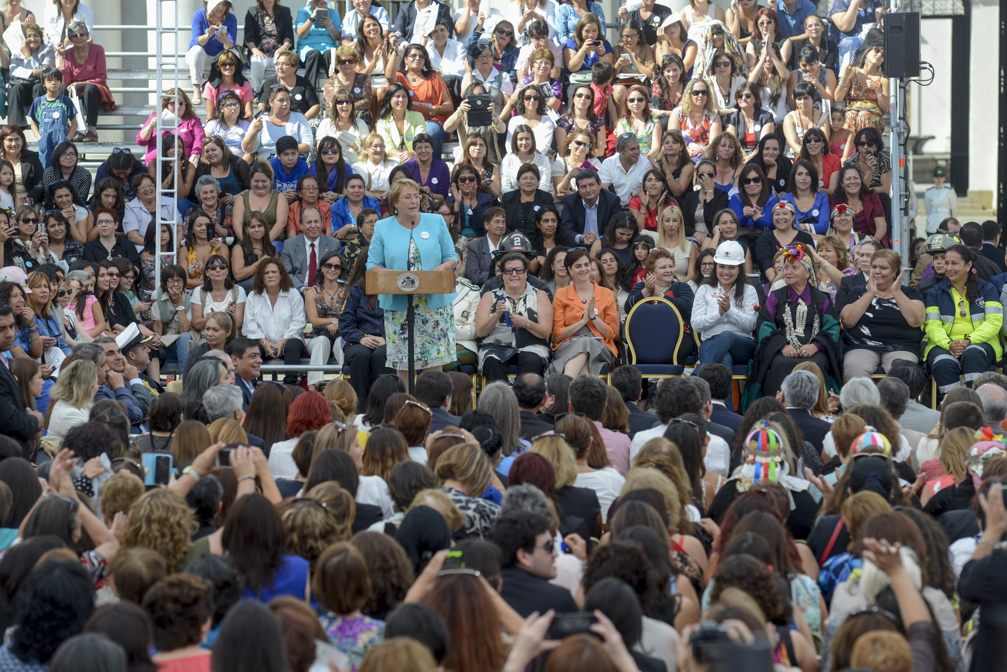 Ministro Álvaro Elizalde participo en la conmemoración internacional del Día de La Mujer, donde la presidenta, Michelle Bachelet, promulgó ley que crea el Ministerio de la Mujer y la Equidad de Género.